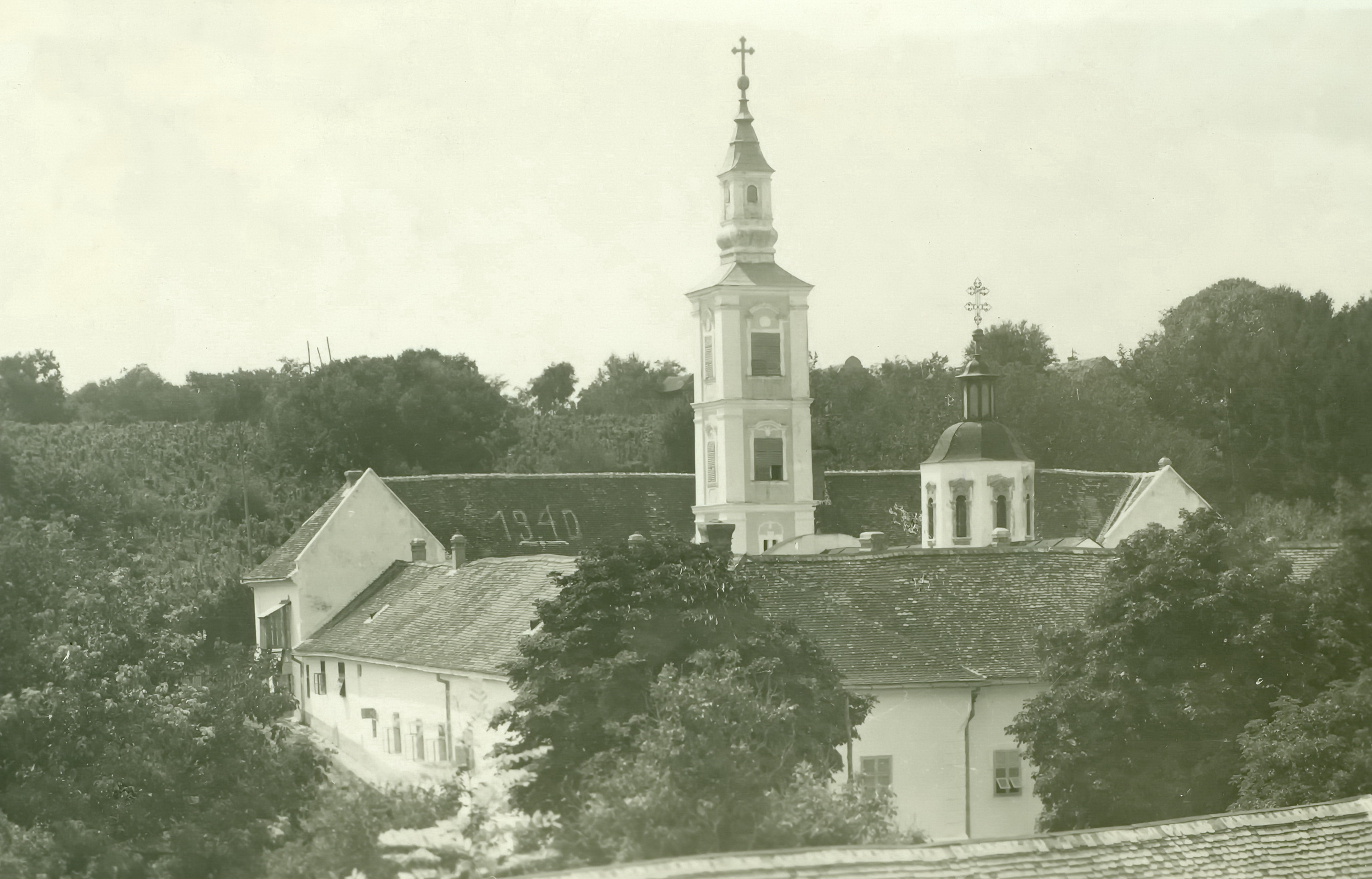 Manastir Krušedol 8. XI. 1941.